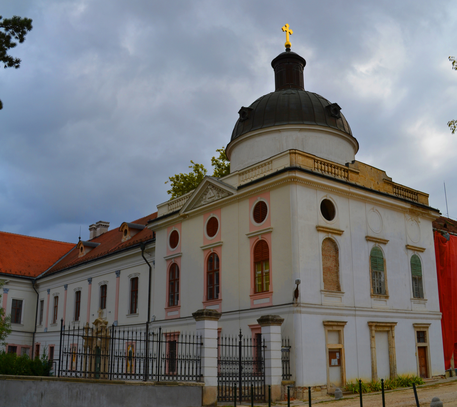 Grassalkovich-kastély kápolnája (római katolikus templom) (Gödöllő, Szabadság tér 1.) This is a photo of a monument in Hungary, Identifier: 14878